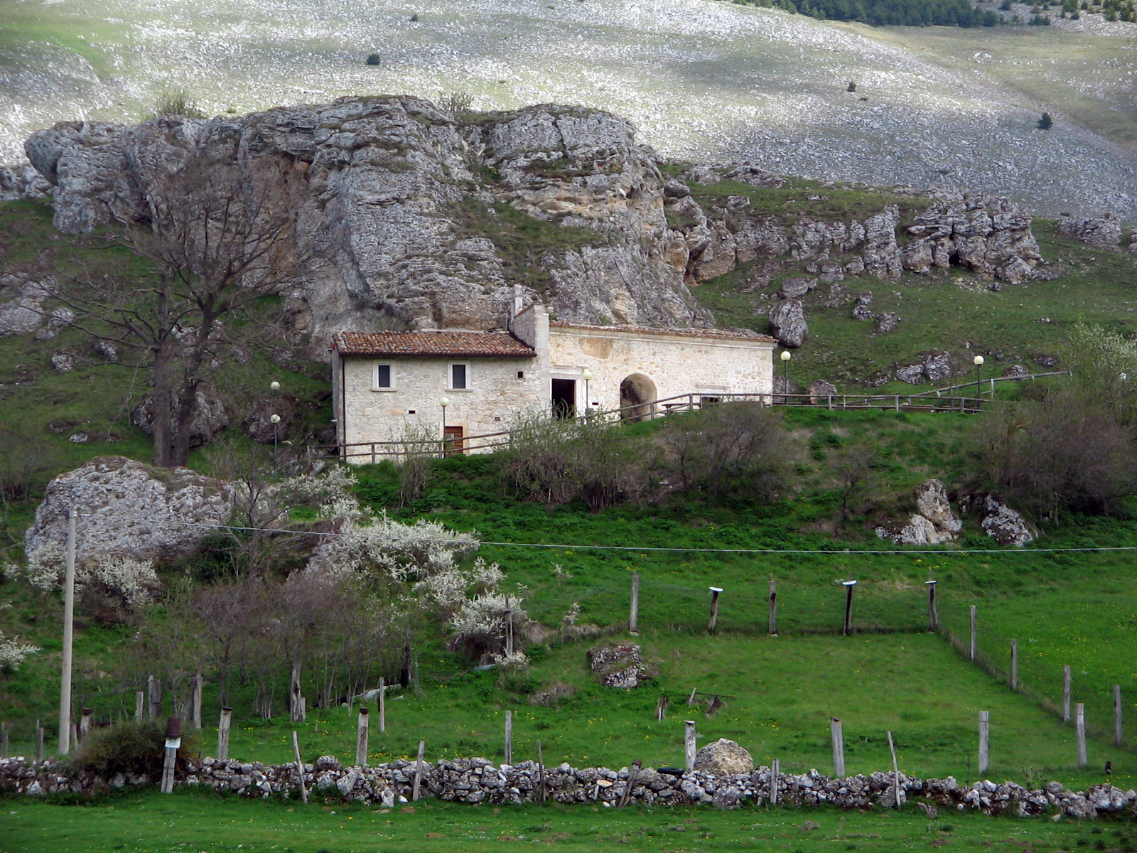 Chiesa rupestre di San Michele Arcangelo a Pescocostanzo